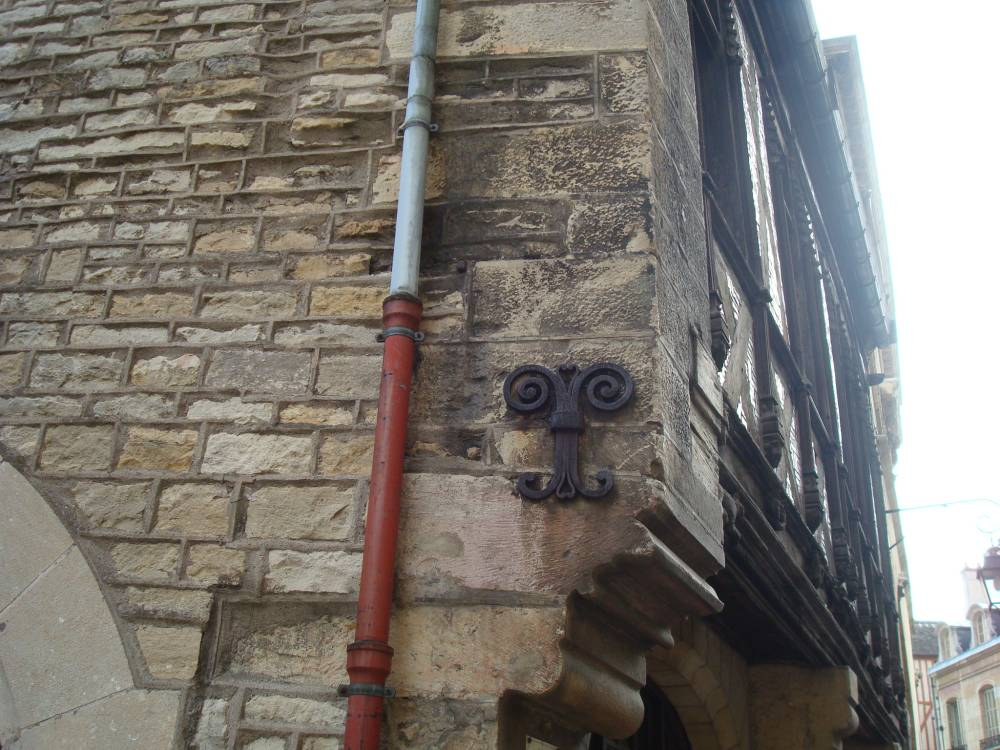 Ancre sur la plus vieille maison de Dijon (France)